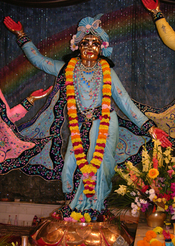 Nityananda